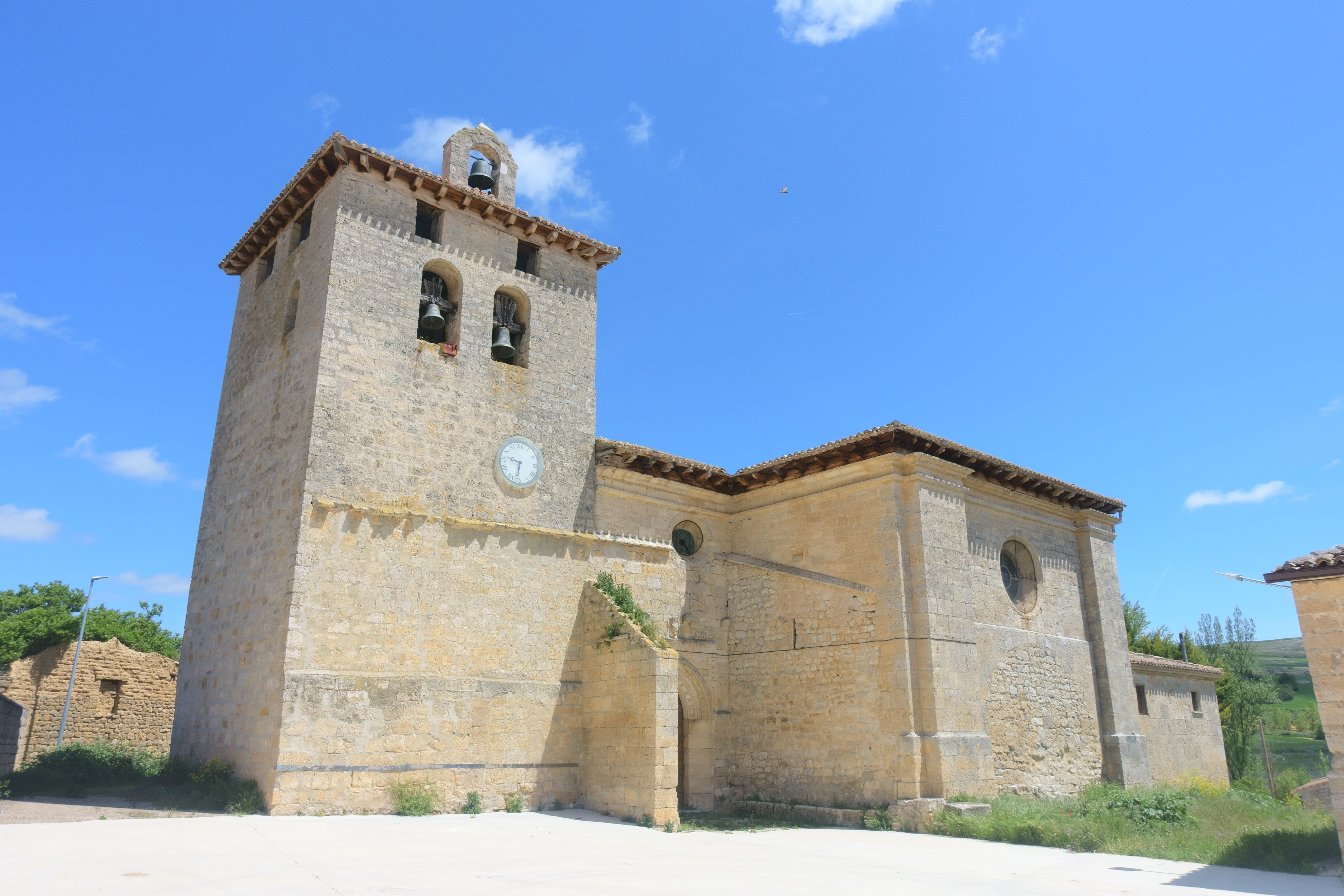 Iglesia de la Asunción, Tamarón (Burgos, España).